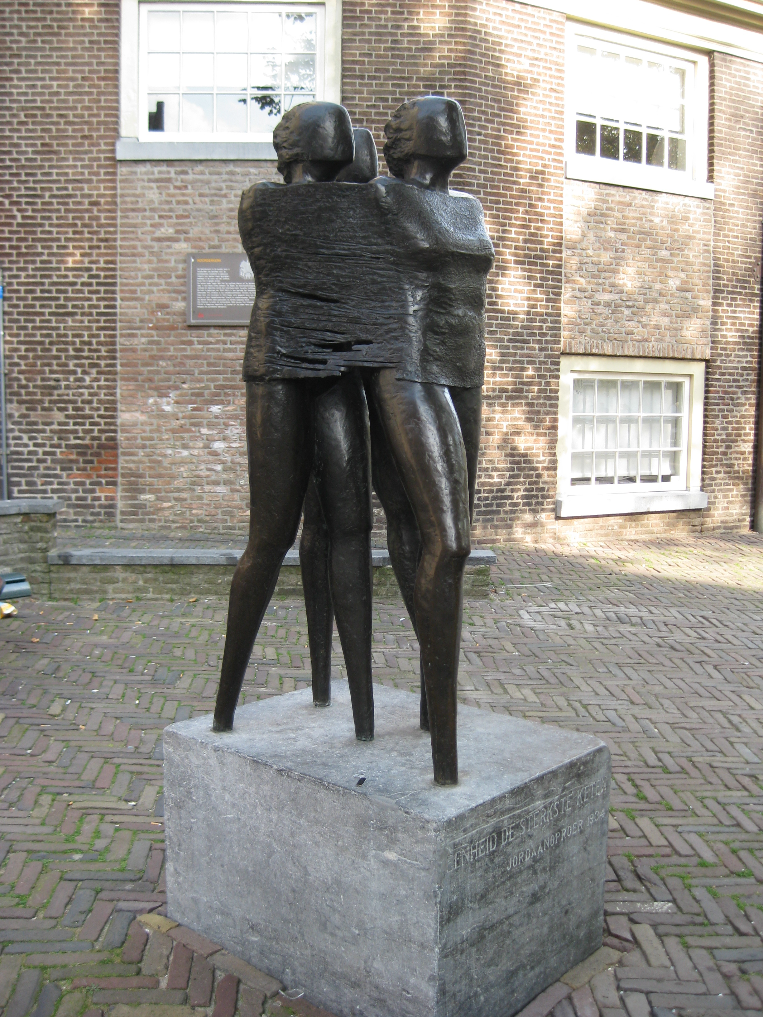 Jordaanoproer, kunstwerk op de Noordermarkt in Amsterdam. Sofie Hupkens, 1987